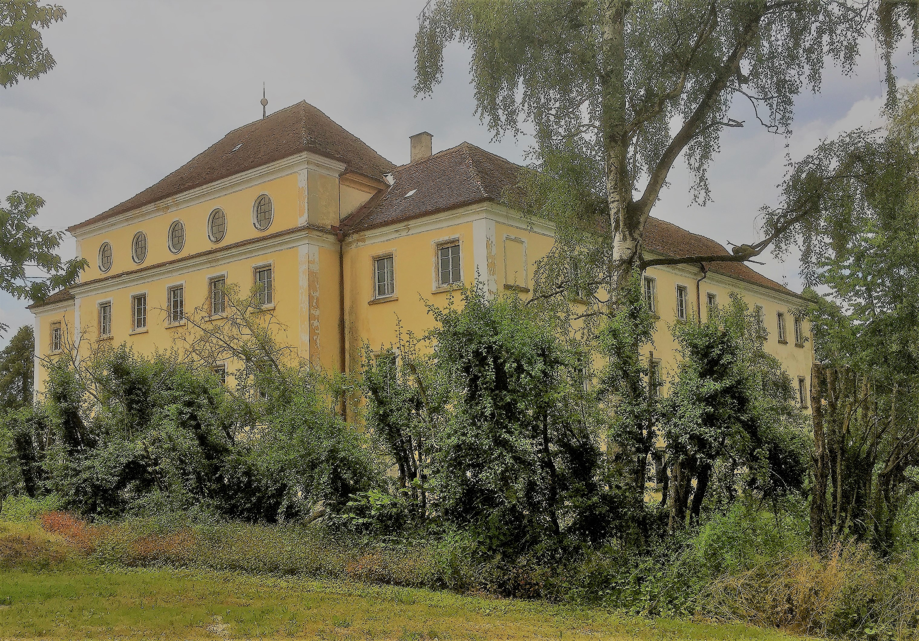 Außenansicht des Staudenschlosses in Mickhausen vor Beginn der Renovierungsarbeiten